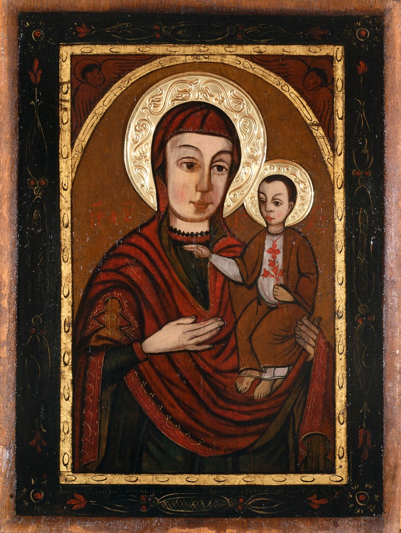 Az eredeti máriapócsi kegykép